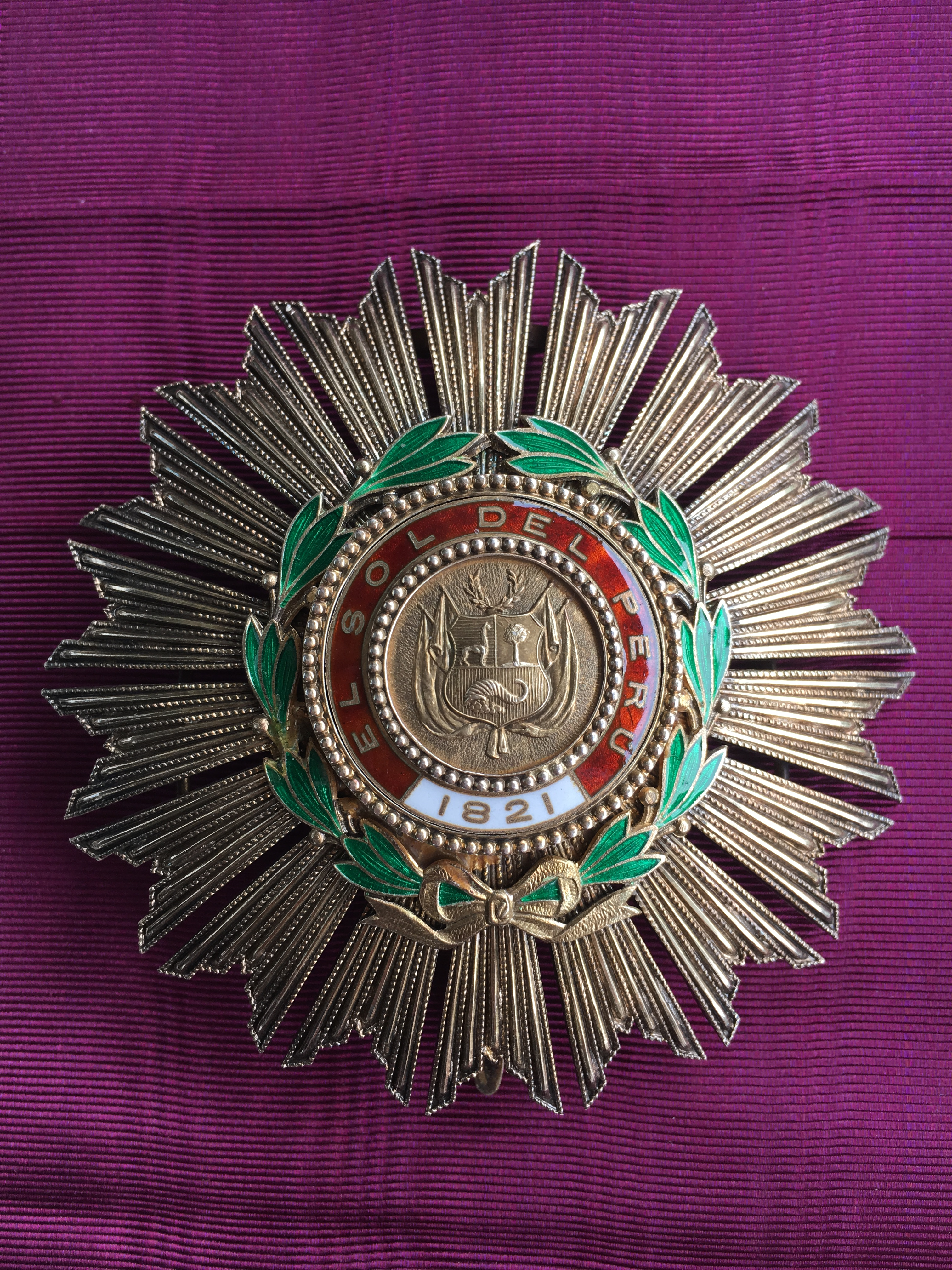 Placa Gran Cruz de la Orden del Sol del Perú, República del Perú. AEA Collections